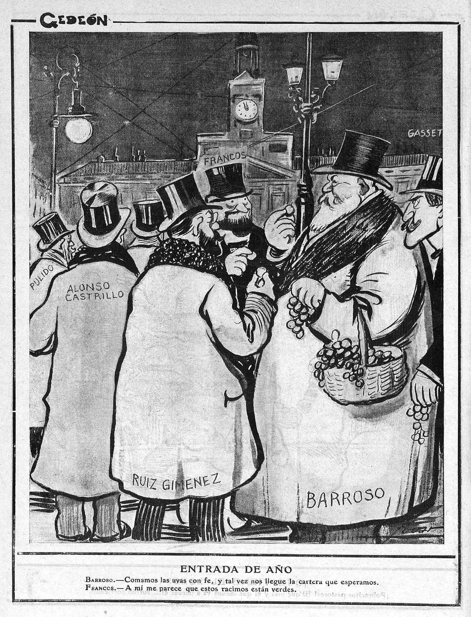 Entrada de año.